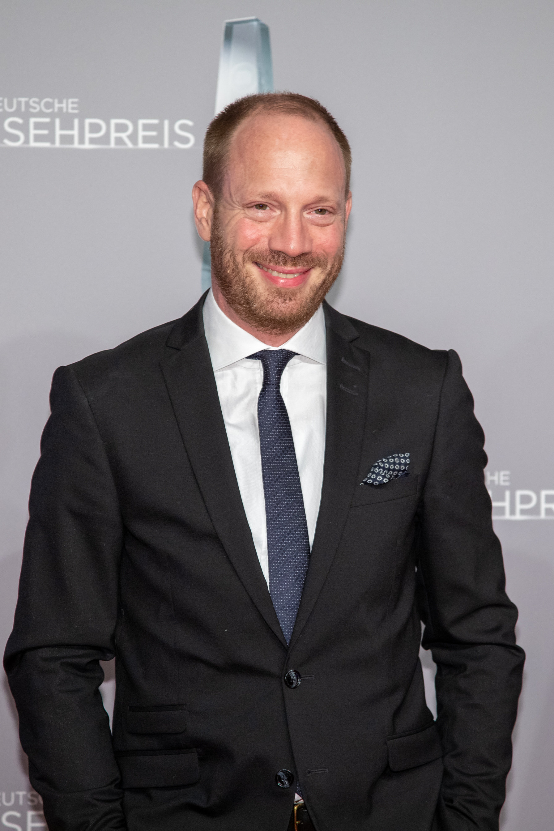 Johann von Bülow beim Deutschen Fernsehpreis 2019 in der Düsseldorfer Rheinterrasse